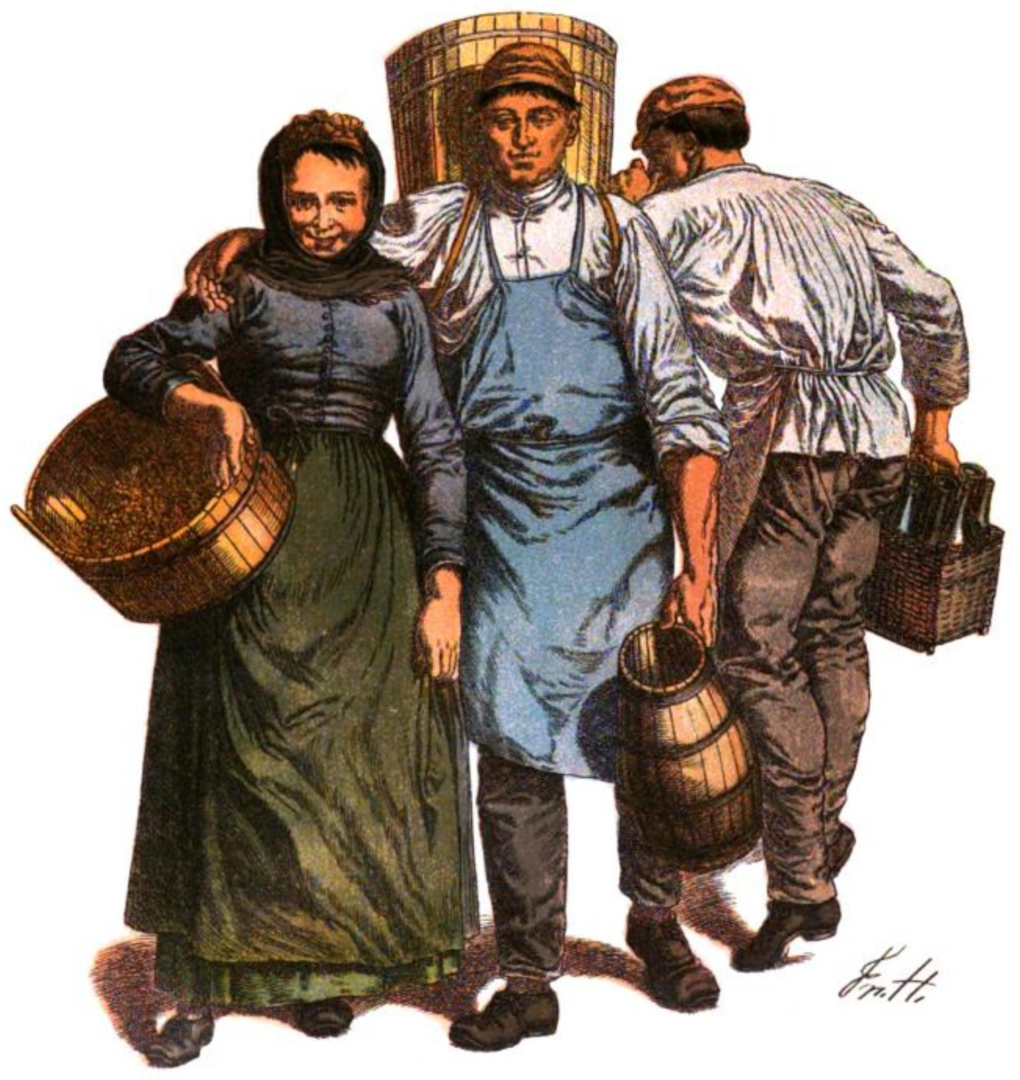 Friedrich Hottenroth: Nassauisches Trachtenbuch Tafel 29: Traubenleser und Kellermeister aus dem unteren Rheingau um 1900